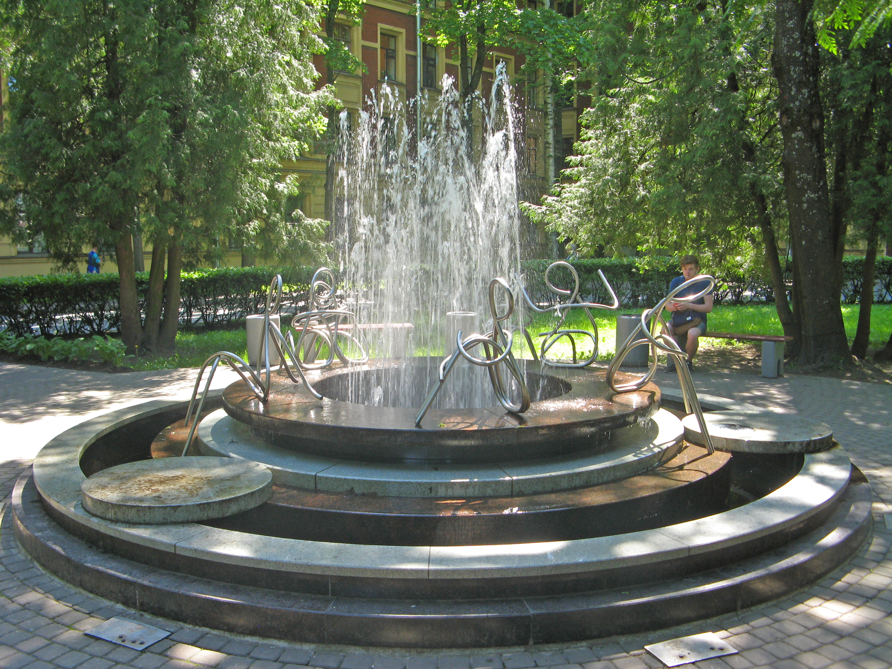 Фонтан "Мы" у 1-го учебного корпуса Политехнического университета, Санкт-Петербург